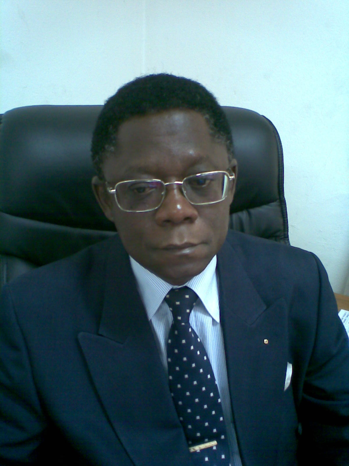 Théodore Holo en 2010